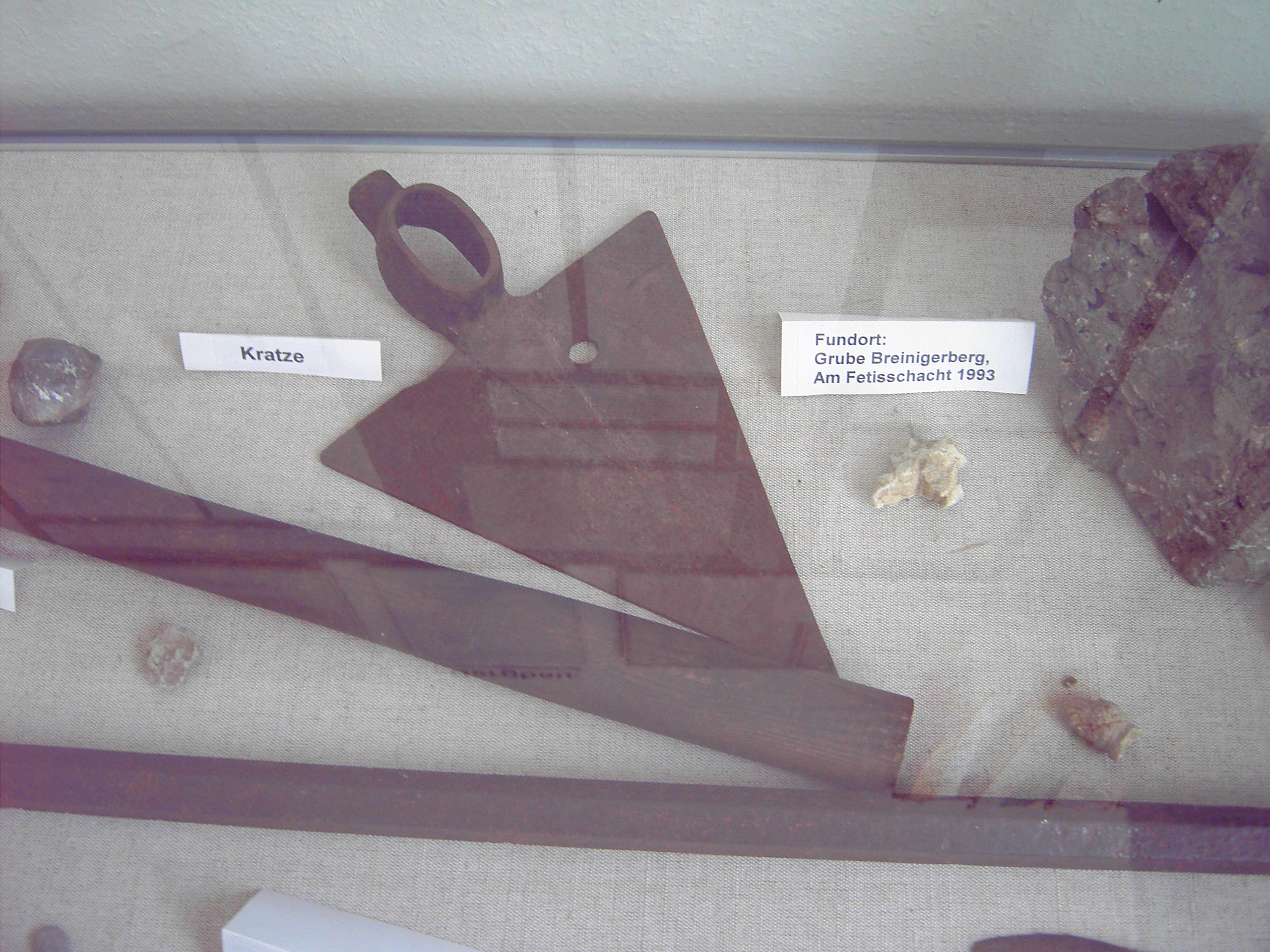 Bergbauwerkzeug, das in den Stollen am Schlangenberg benutzt wurde